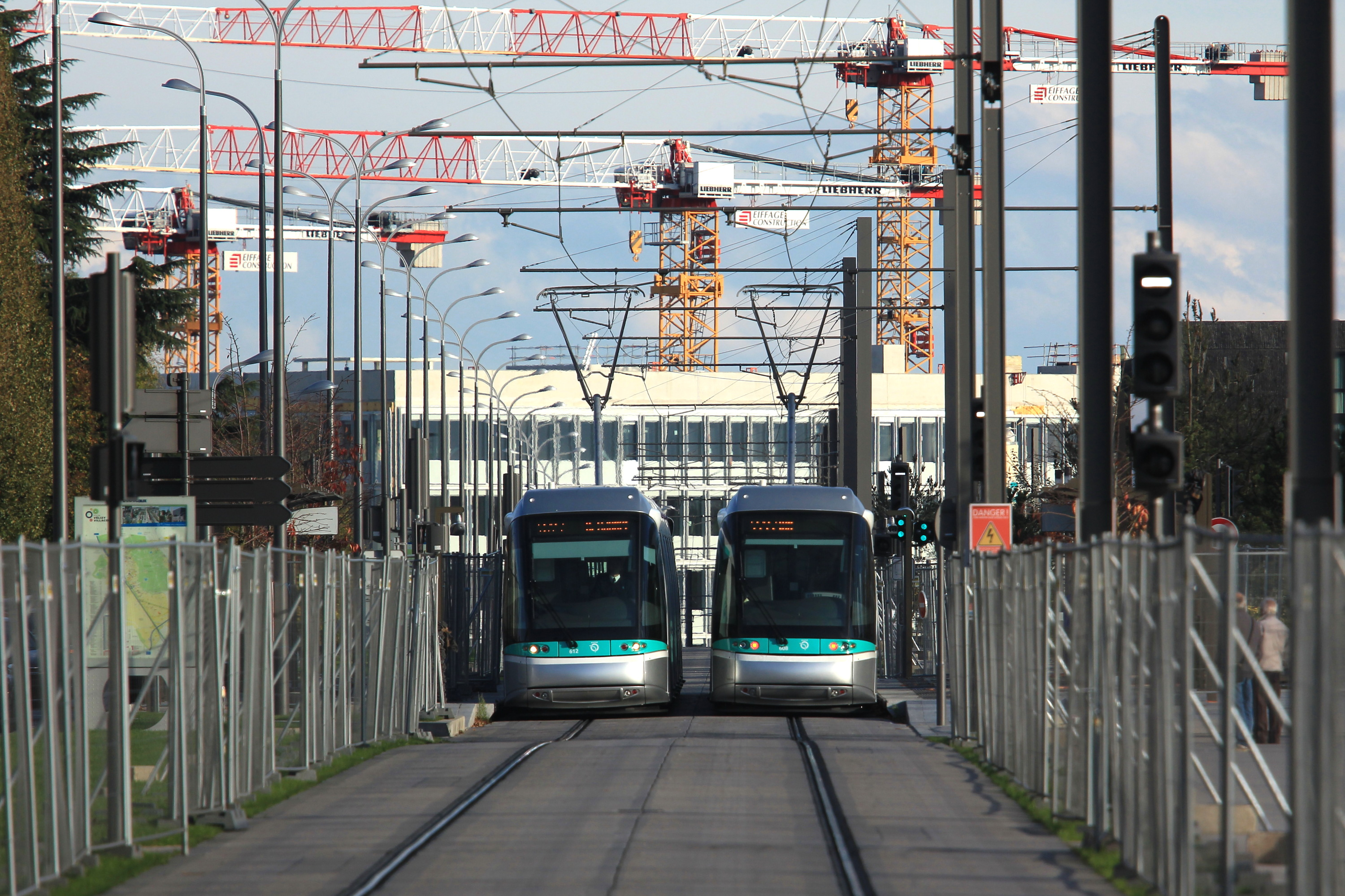 Deux rames de tramway en essais se croient à la station « Louvois ».